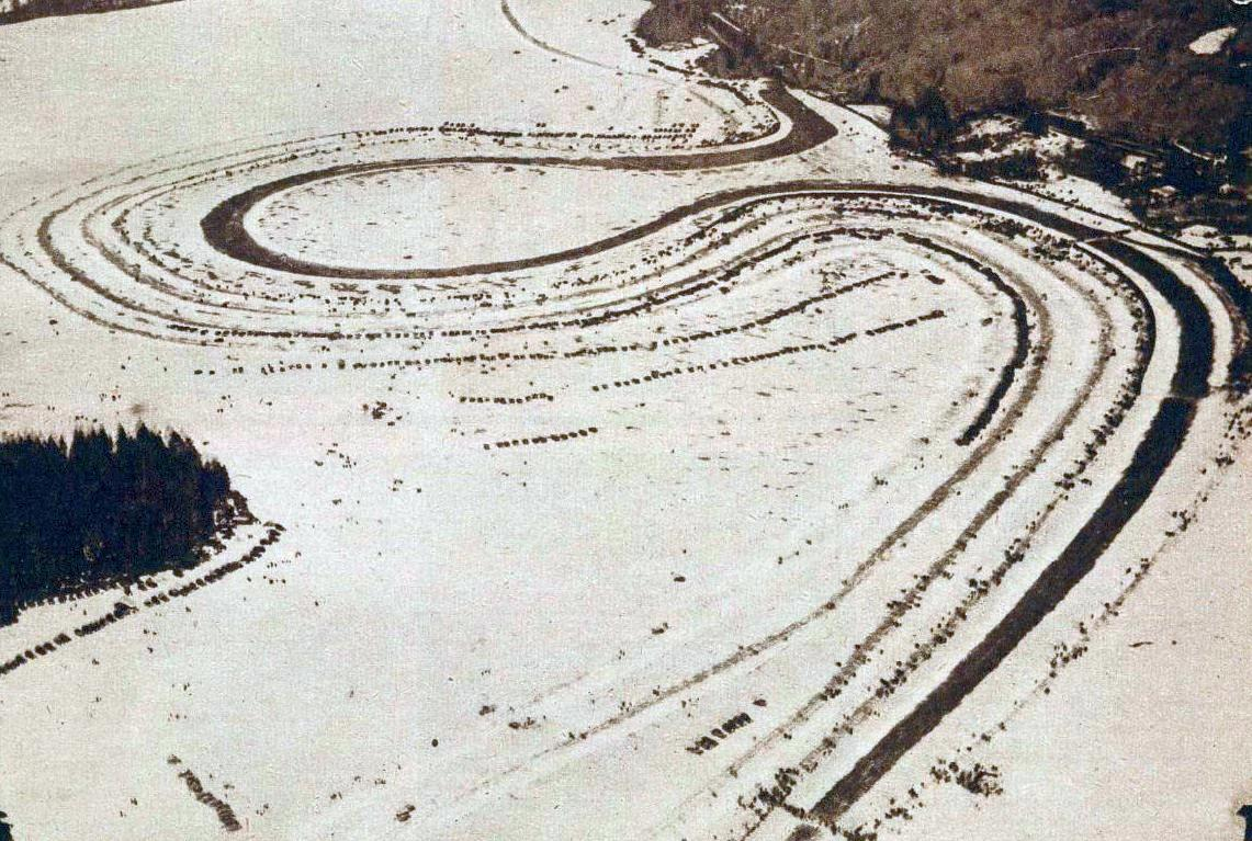 Vue aérienne du Lac Rämen pour le Grand Prix automobile d'hiver de Suède 1932 (gagné par Sven Olaf Bennström sur Ford).